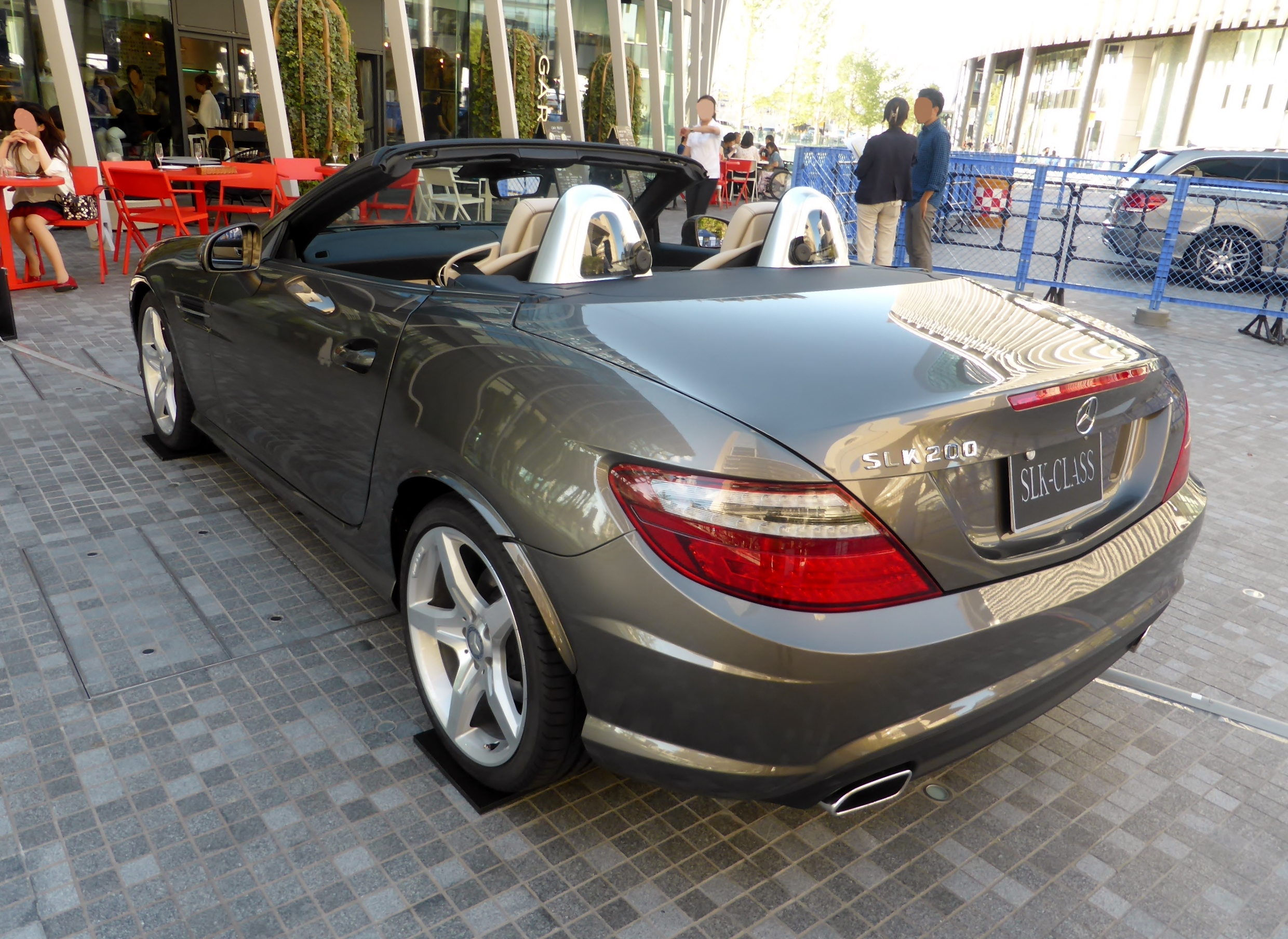 R172型メルセデス・ベンツSLK200ブルーエフィシェンシーMTをリアから撮影。